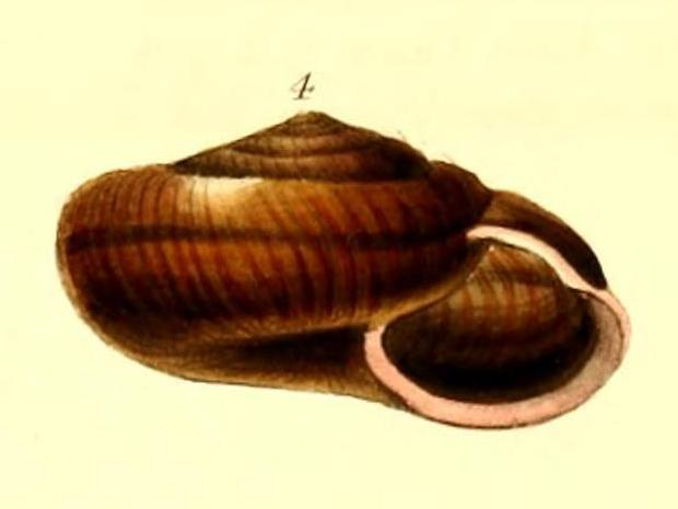 ヒロベソカタマイマイのタイプの図（Type figure of Helix luhuanus Sowerby, 1839 [ = Mandarina luhuana (Sowerby, 1839) ] (Bradybaenidae)